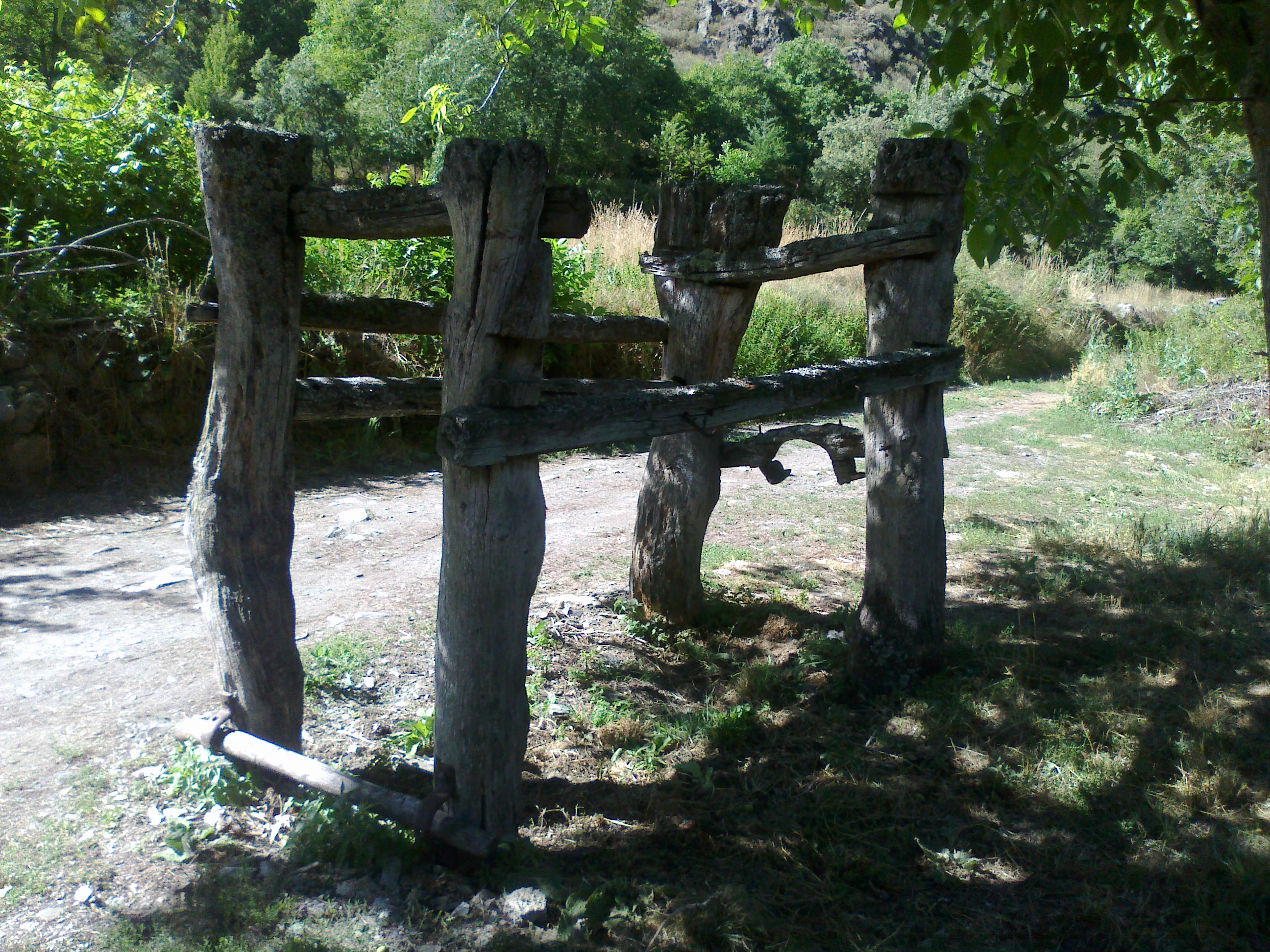 Colinas del Campo de Martín Moro Toledano, en Igüeña (provincia de León, España).